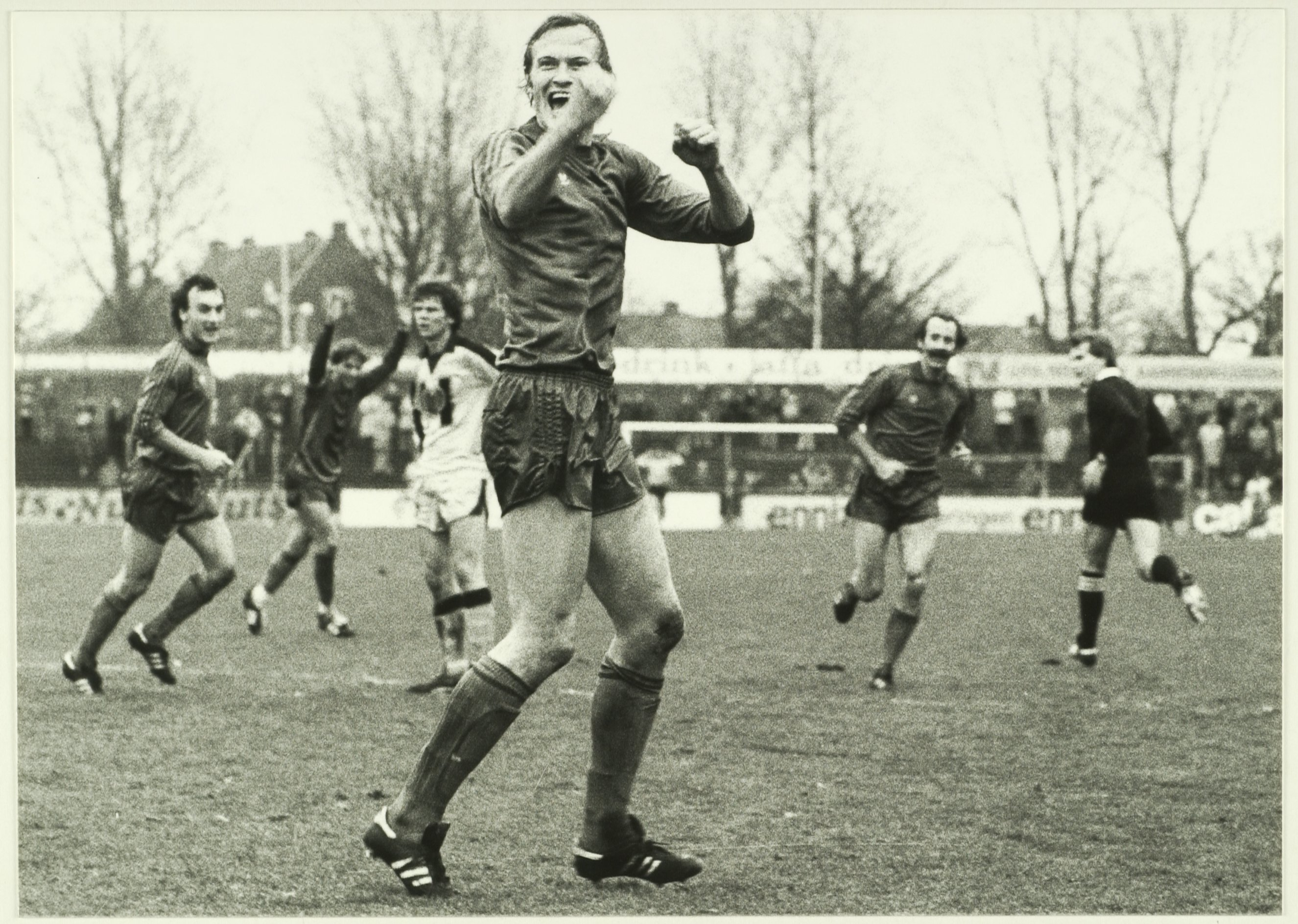 CollectieCollectie Fotoburo de BoerInventarisnummerNL-HlmNHA_5400466684NL-HlmNHA_1478_20096k28aBeschrijvingSpelmoment uit de wedstrijd HFC Haarlem-Heracles, eindstand 5-0. Op de foto v.l.n.r.: Terry Hendriks, Martin Haar, Piet Huyg en Abe van den Ban.FotonummerNL-HlmNHA_5400466684DocumenttypeHistorieprenten, tekeningen en foto'sVervaardigerBoer, Cees de (1918-1985) Soort vervaardigerFotograaf AnnotatiesHD.241180PersonenHendriks, TerryHaar, MartinHuyg, PietBan, Abe van den LandNederland ProvincieNoord-Holland GemeenteHaarlem PlaatsHaarlem StraatJan Gijzenkade Begindatum11-1980Einddatum11-1980Datering gebeurtenis23-11-1980TechniekFoto TrefwoordenSport en recreatie, Voetbalclubs, voetbalverenigingen, voetbalwedstrijden Plaatsinggb61